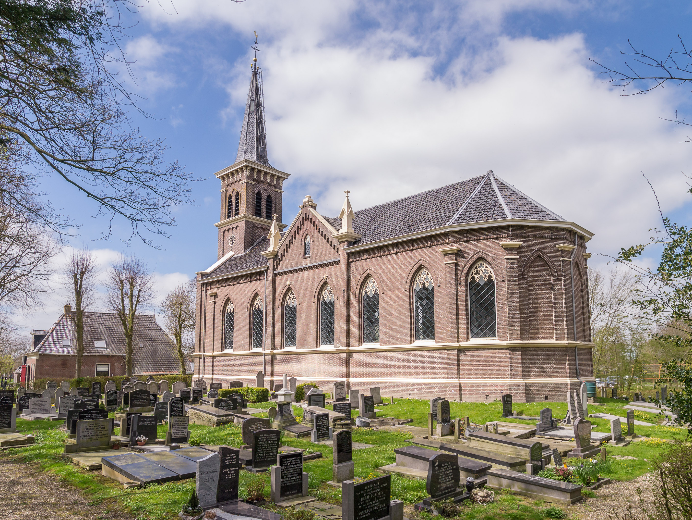 Hervormde kerk, Cornjum